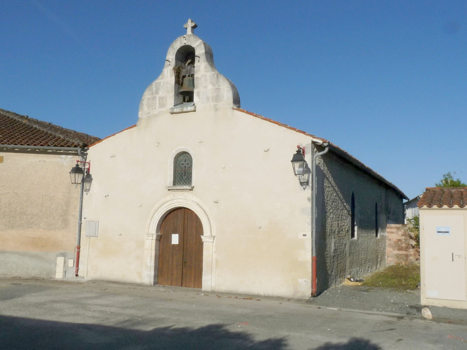 Eglise de Salignac-sur-Charente, Charente-Maritime, France